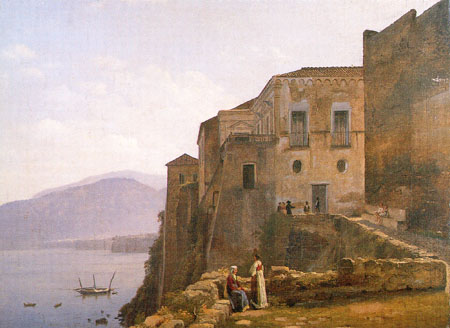 Casa natale di Torquato Tasso a Sorrento, o/t, 35 x 47 cm, Coll. privata